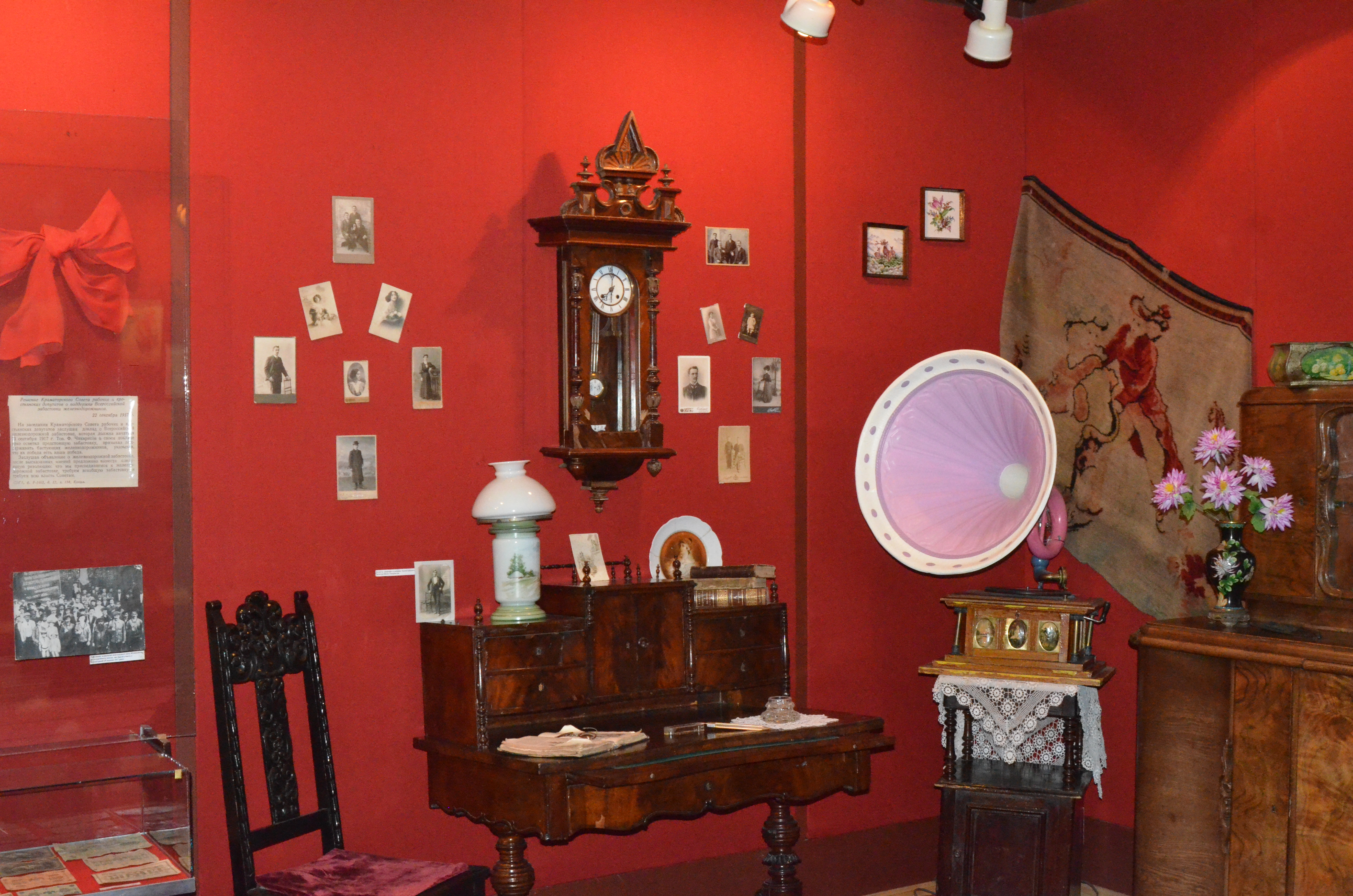 Музей истории города Краматорска